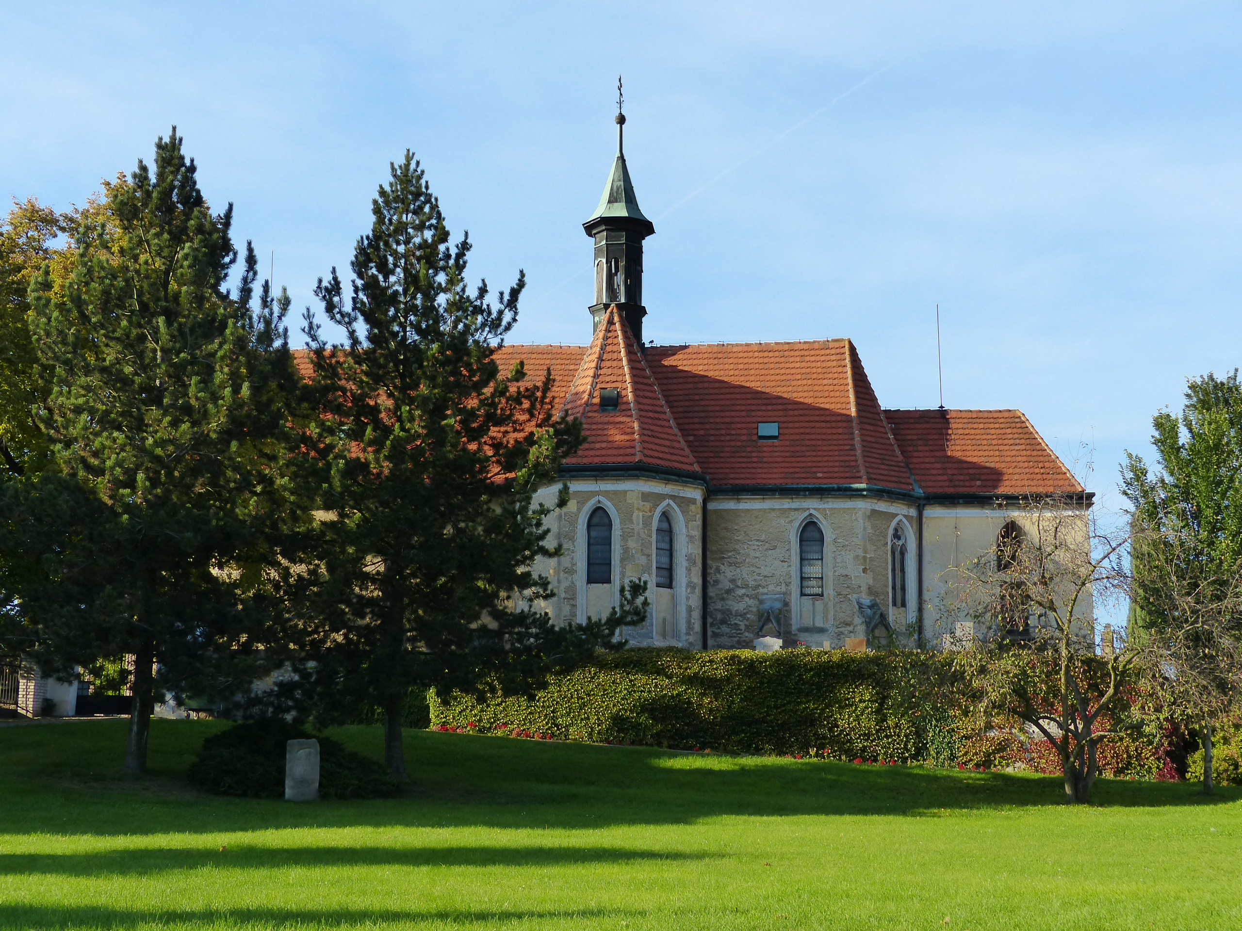 Kostel Nalezení svatého Kříže, Bříství.